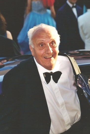 Pierre Tchernia au festival de Cannes.